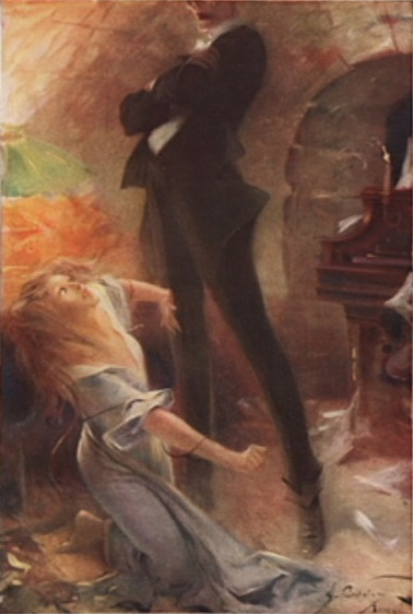 L'une des cinq aquarelles d'André Castaigne illustrant la première édition américaine du Fantôme de l'Opéra de Gaston Leroux (1911).